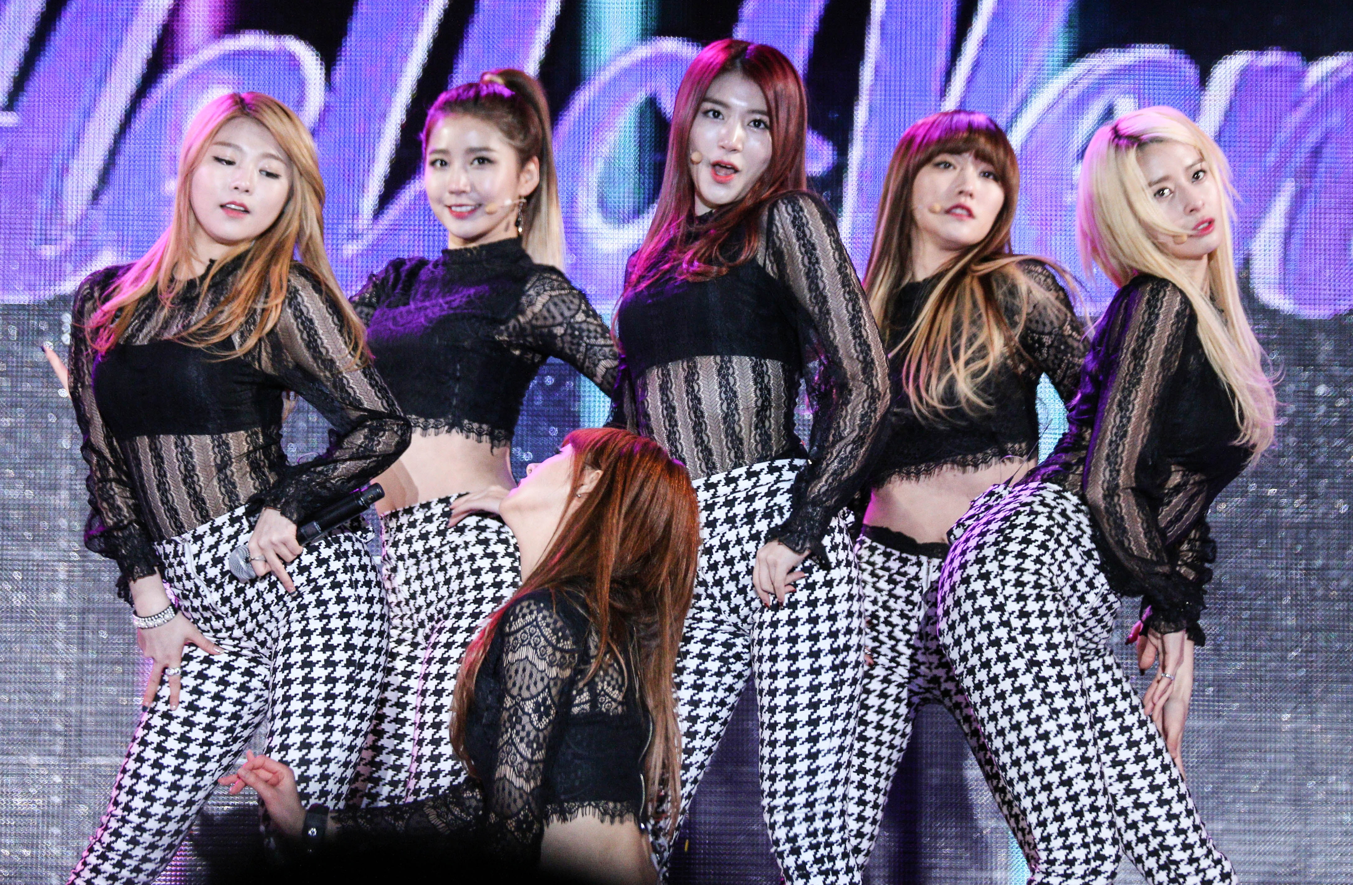 141211 헬로비너스 더쇼 in 코엑스 야외무대